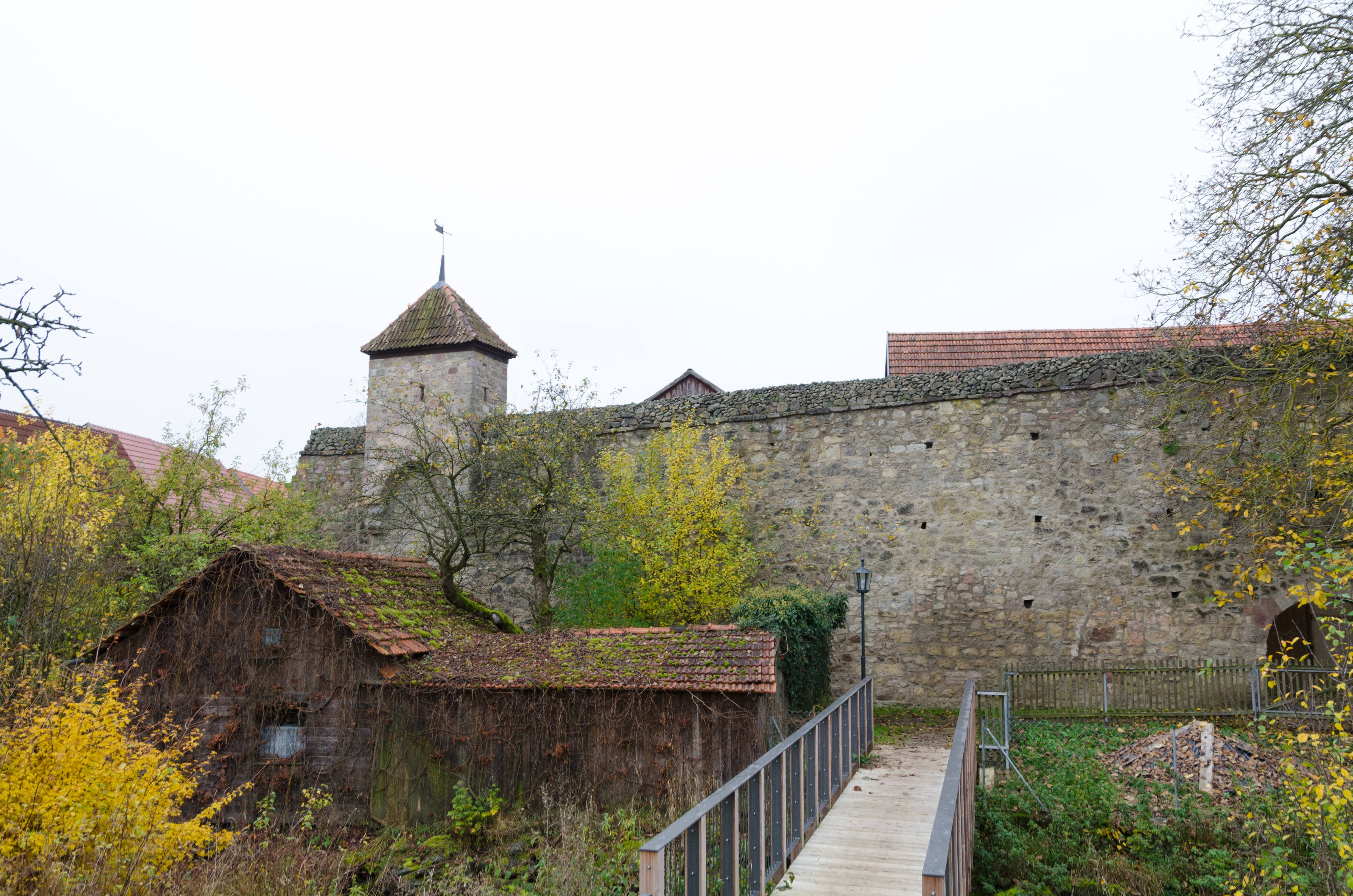 Stadtmauer Flandungen